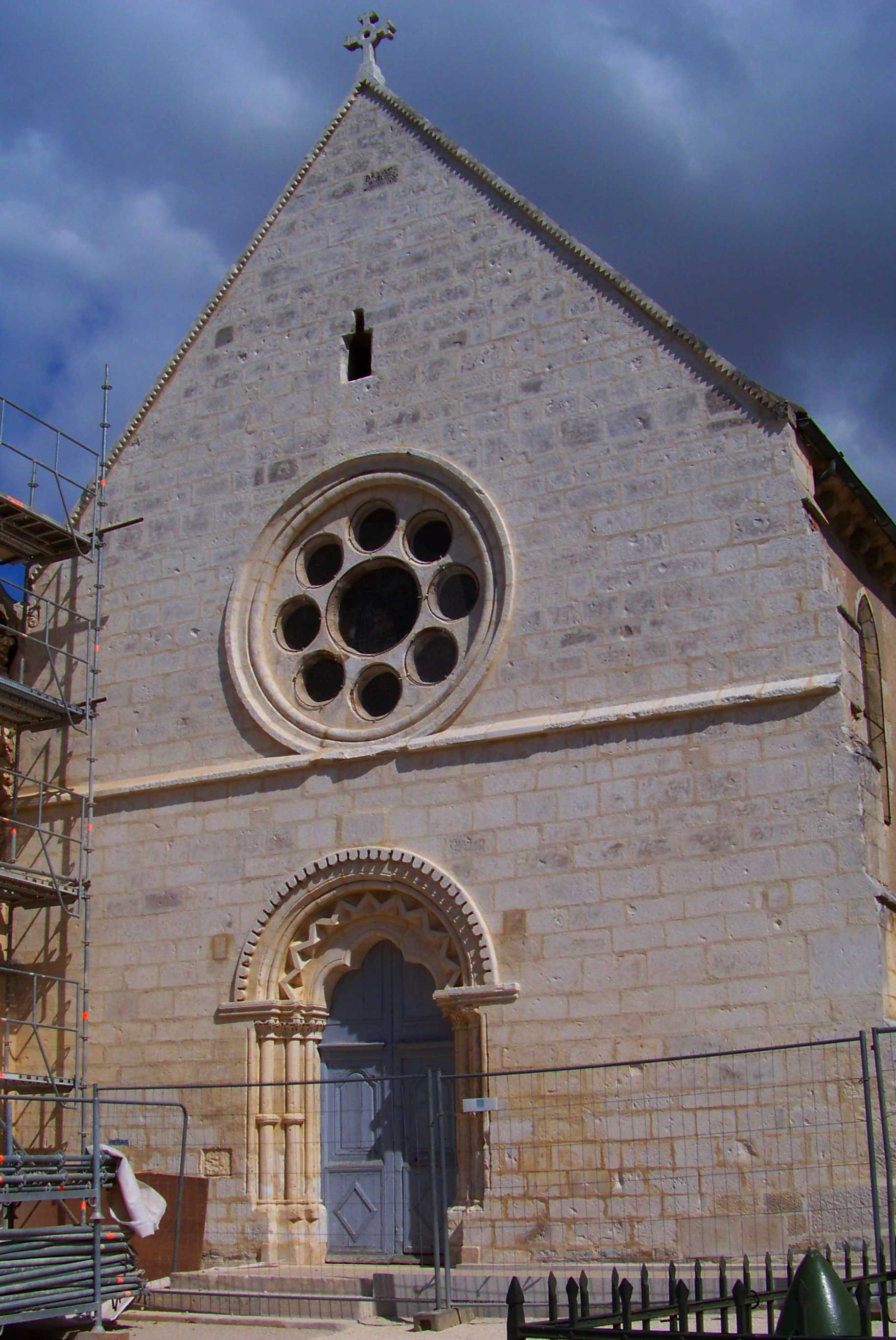 Église de Quenne, façade occidentale